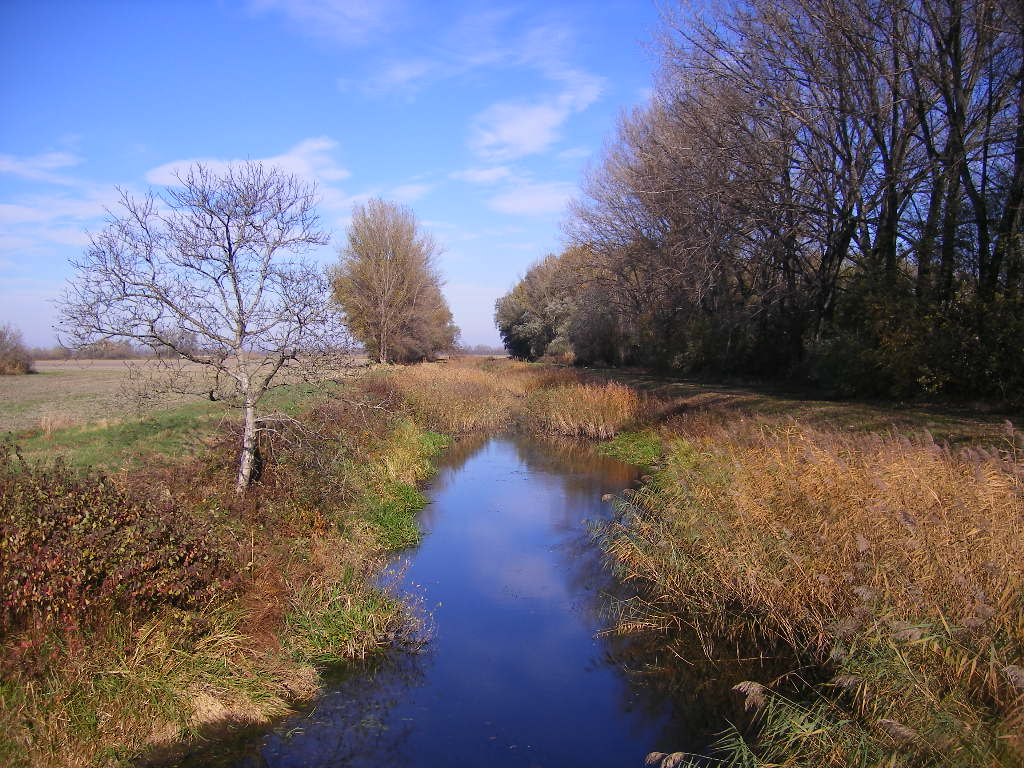 Balony - a Csiliznyárad-Füzespusztai kanális (jobb partja Balony, bal partja Csiliznyárad községhez tartozik).